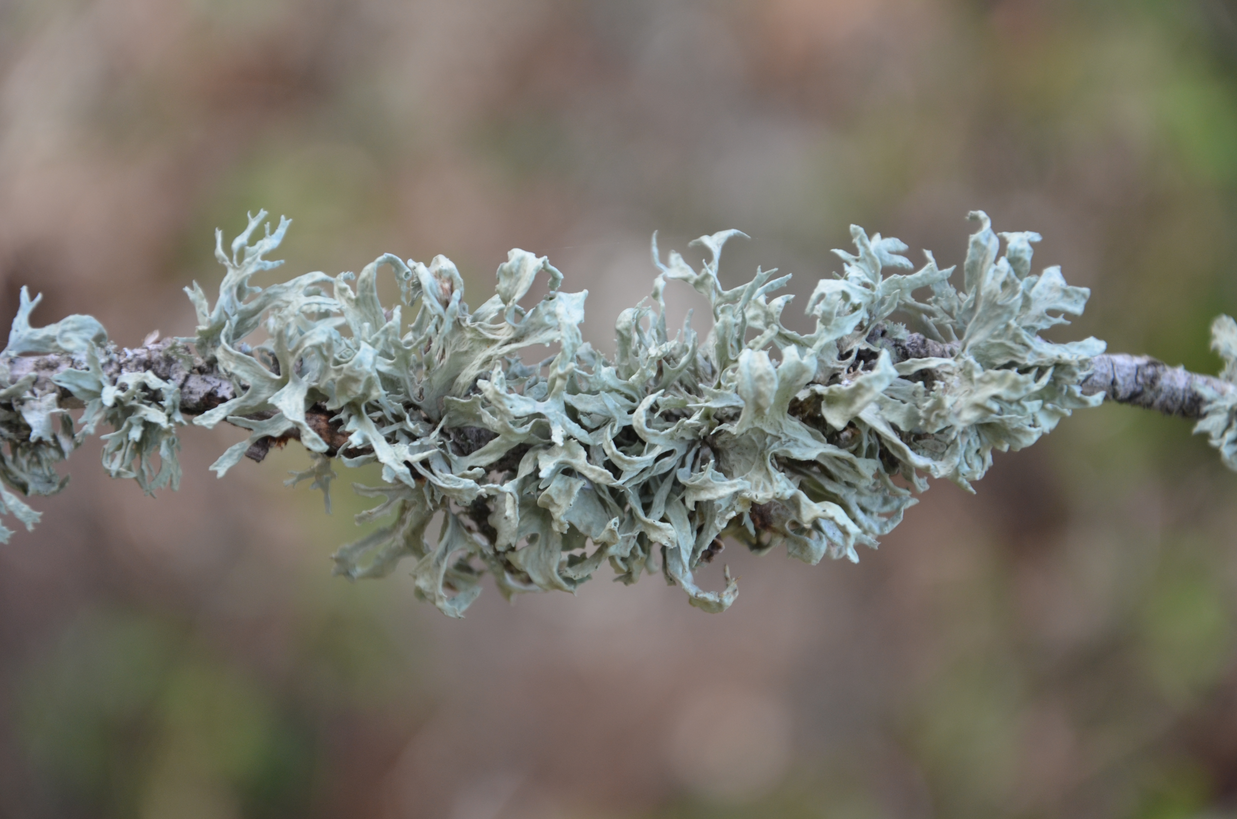 Ramalia canariensis, littoral méditerranéen (Aude)